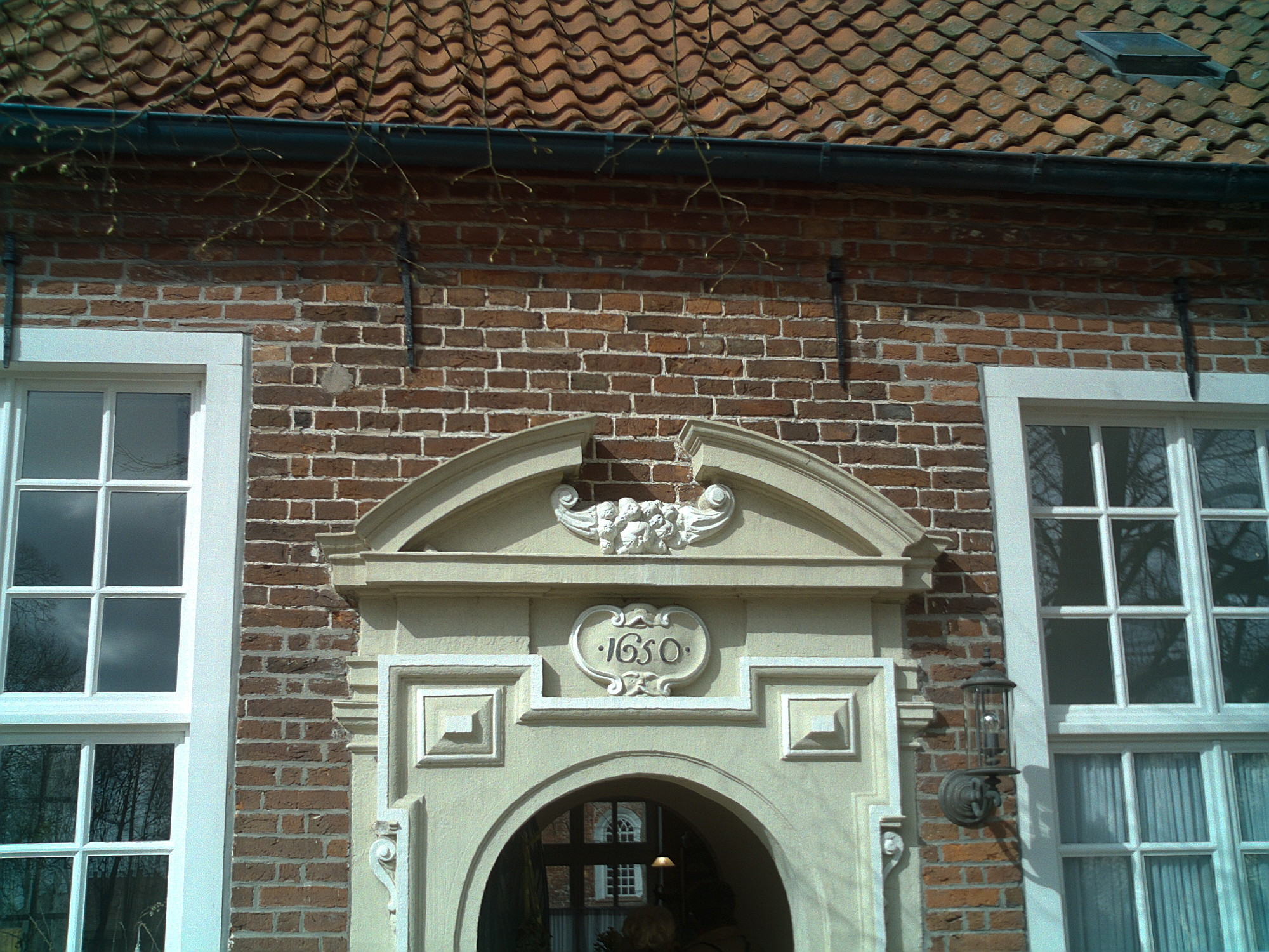 Portal eines Nebengebäudes der Evenburg